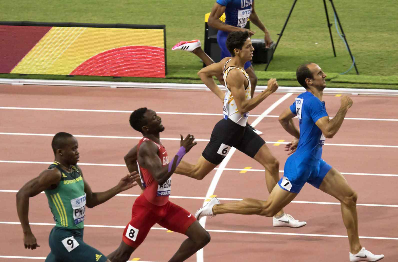 DOH60147 400m men semifinal sacoor